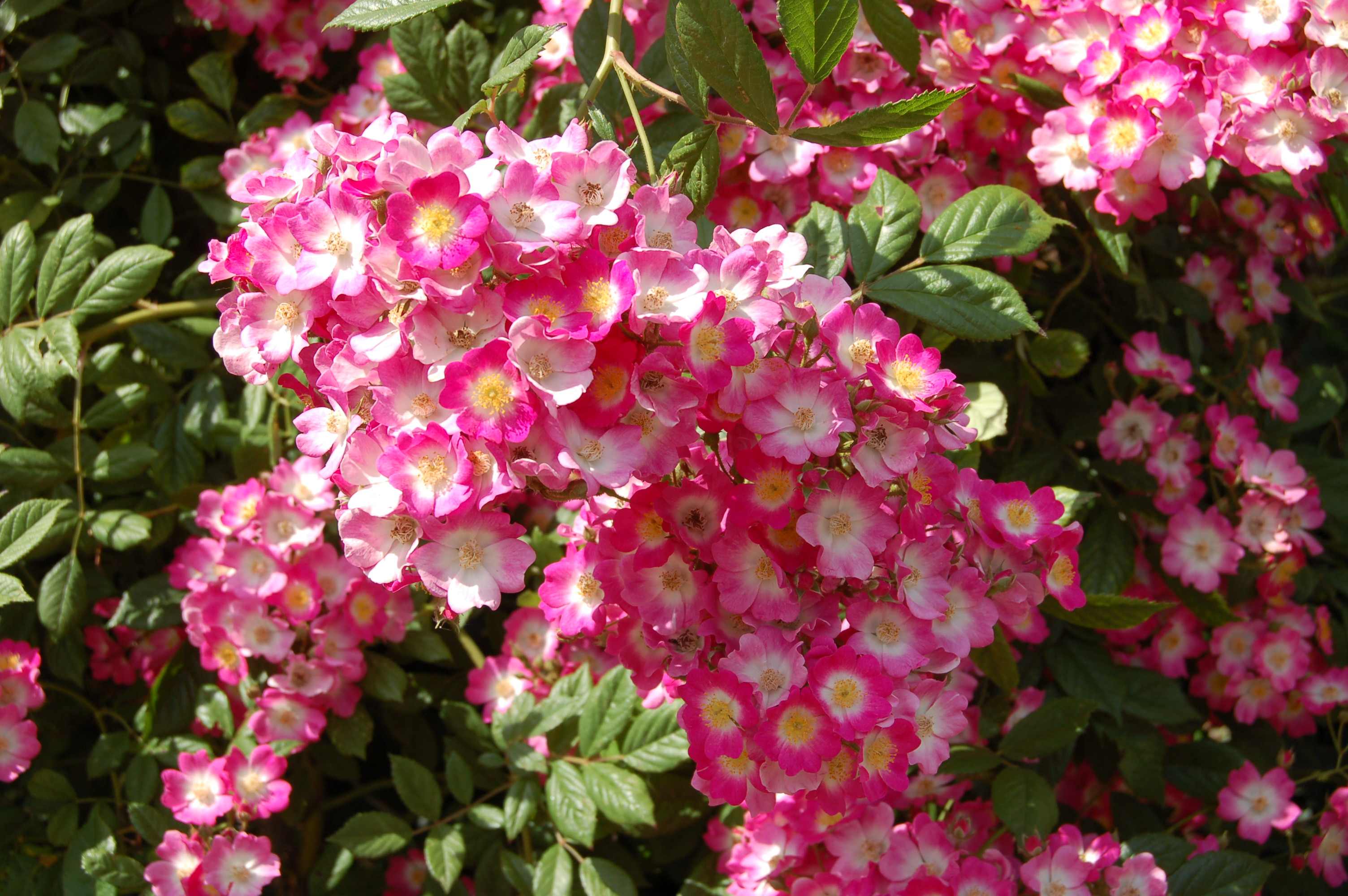 Rosa 'Mozart'